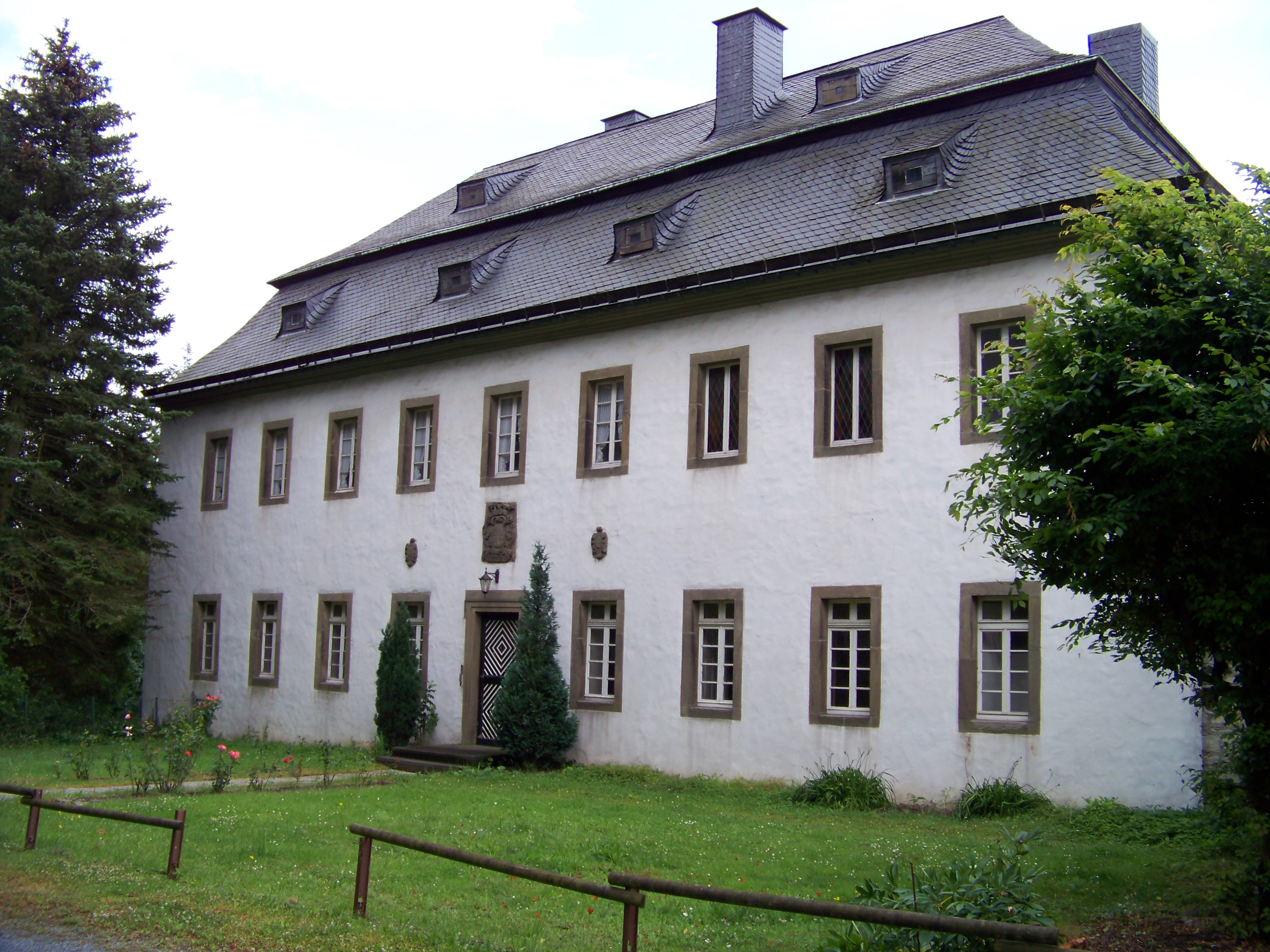 Deutschordenskommende Mülheim, Rentei, Warstein-Sichtigvor (Germany)